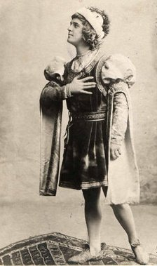 Shakespeare, William: A velencei kalmár. Társulat: Nemzeti Színház, Budapest. Bemutató: 1900. Szereplők: Aragónia hercege: Náday Béla.